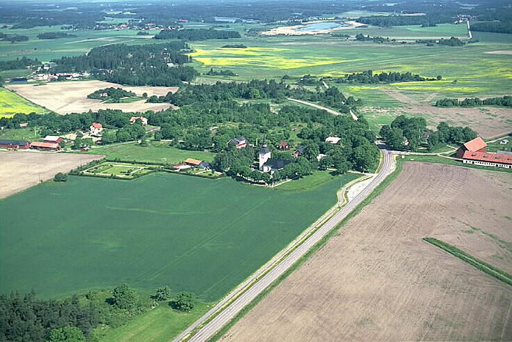 Skå kyrka i bildens mitt. Motiv: Skå Nyckelord: Flygbilder, Riksintressen Kategori: Miljöer, OdlingslandskapSkå kyrka i bildens mitt.